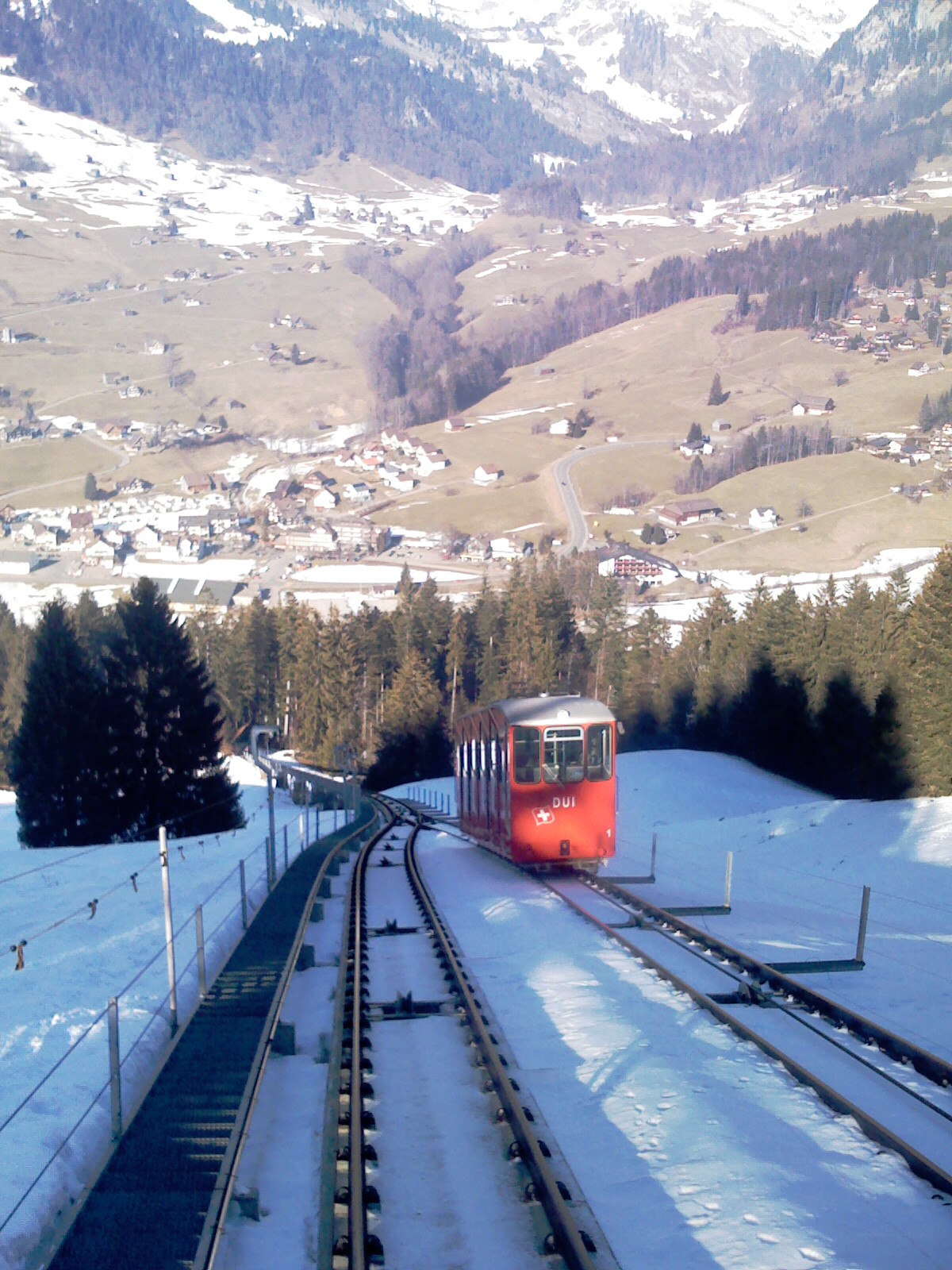 Iltios rail ropeway - Iltios-reltelefero de Unterwasser al la Iltios, alportanto al la Chäserrugg-aertelefero